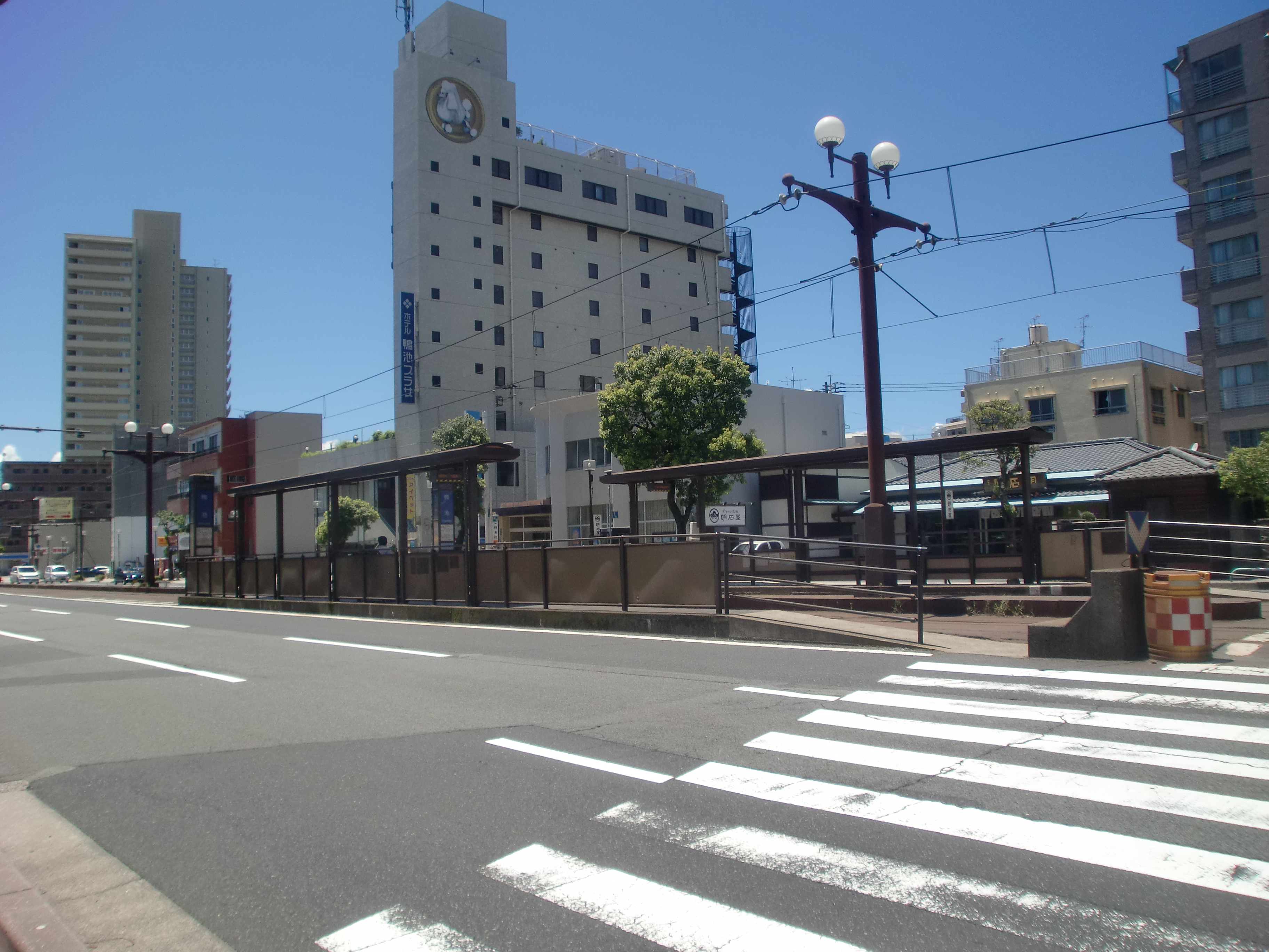 鴨池駅の外観